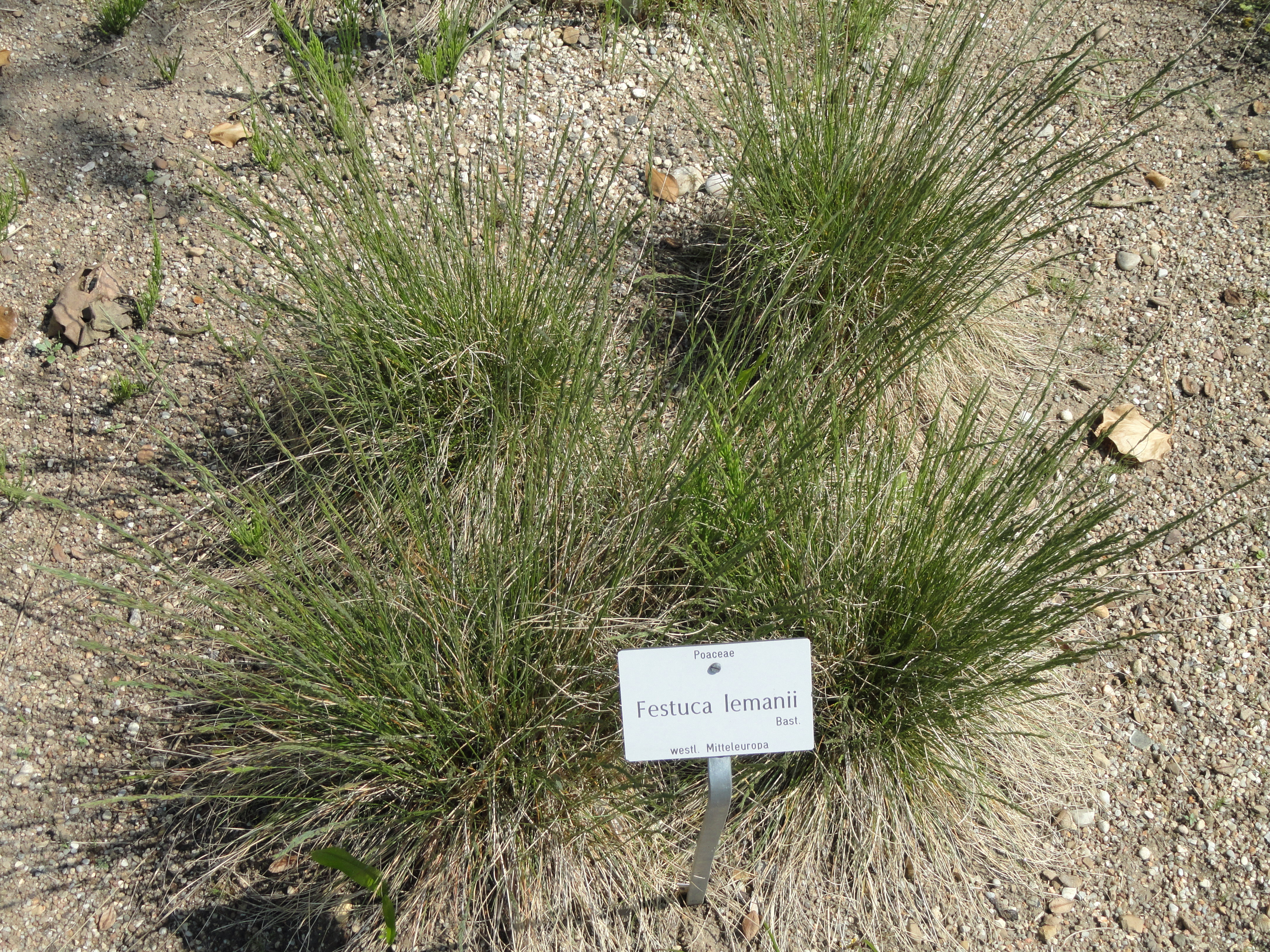 Festuca lemanii specimen in the Botanischer Garten München-Nymphenburg, Munich, Germany.